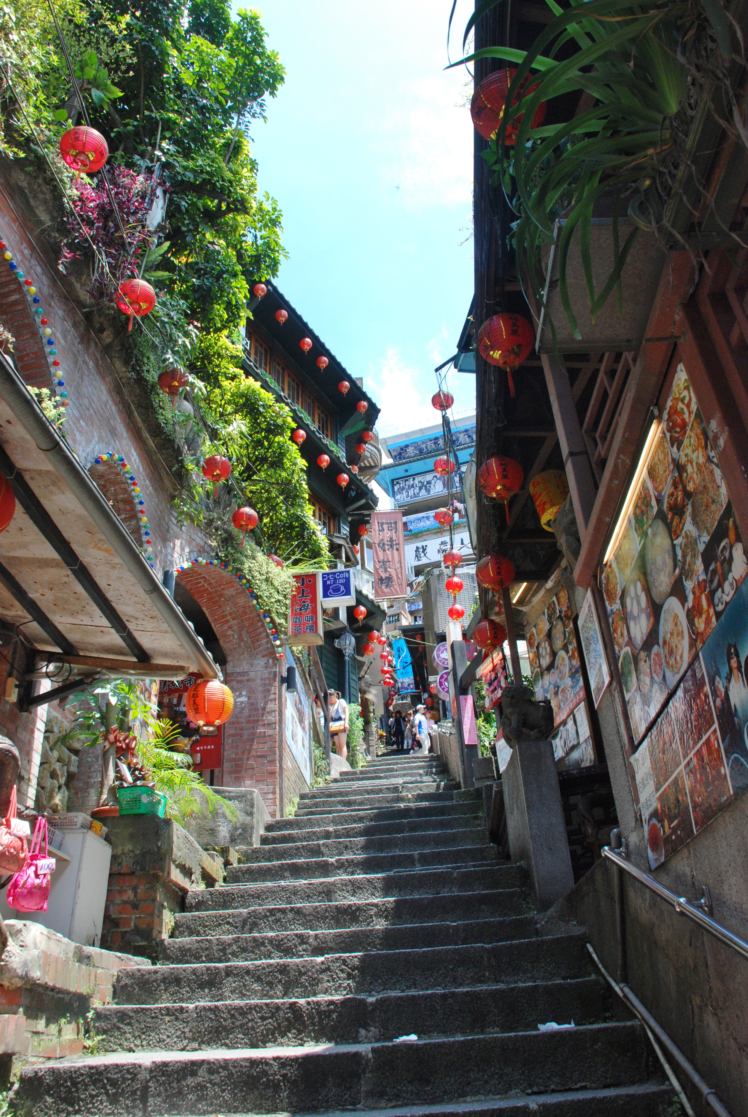 224, Taiwan, 新北市瑞芳區崇文里